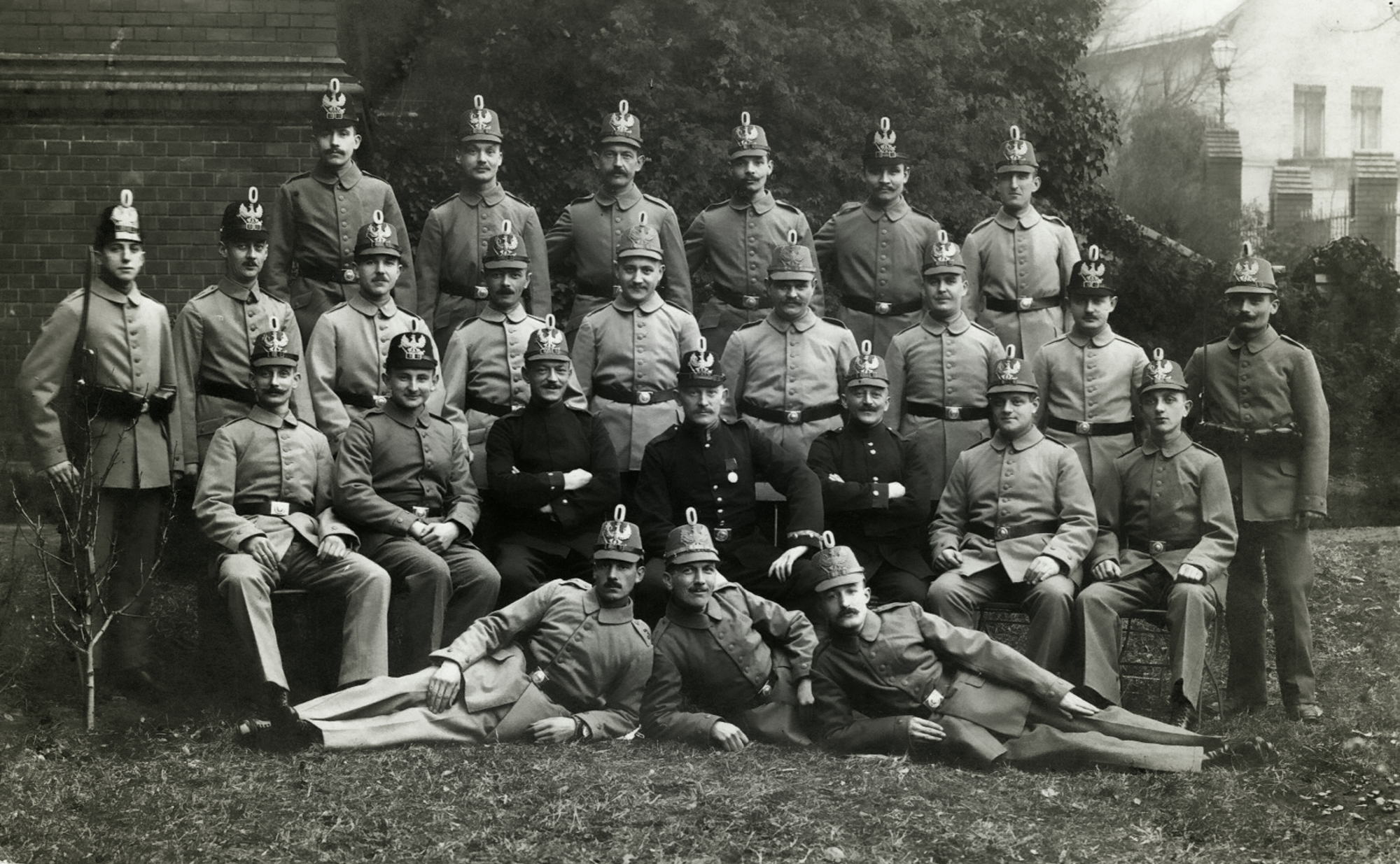 Lübbener Jäger der Ersatzabteilung im Kasernement Lübben.